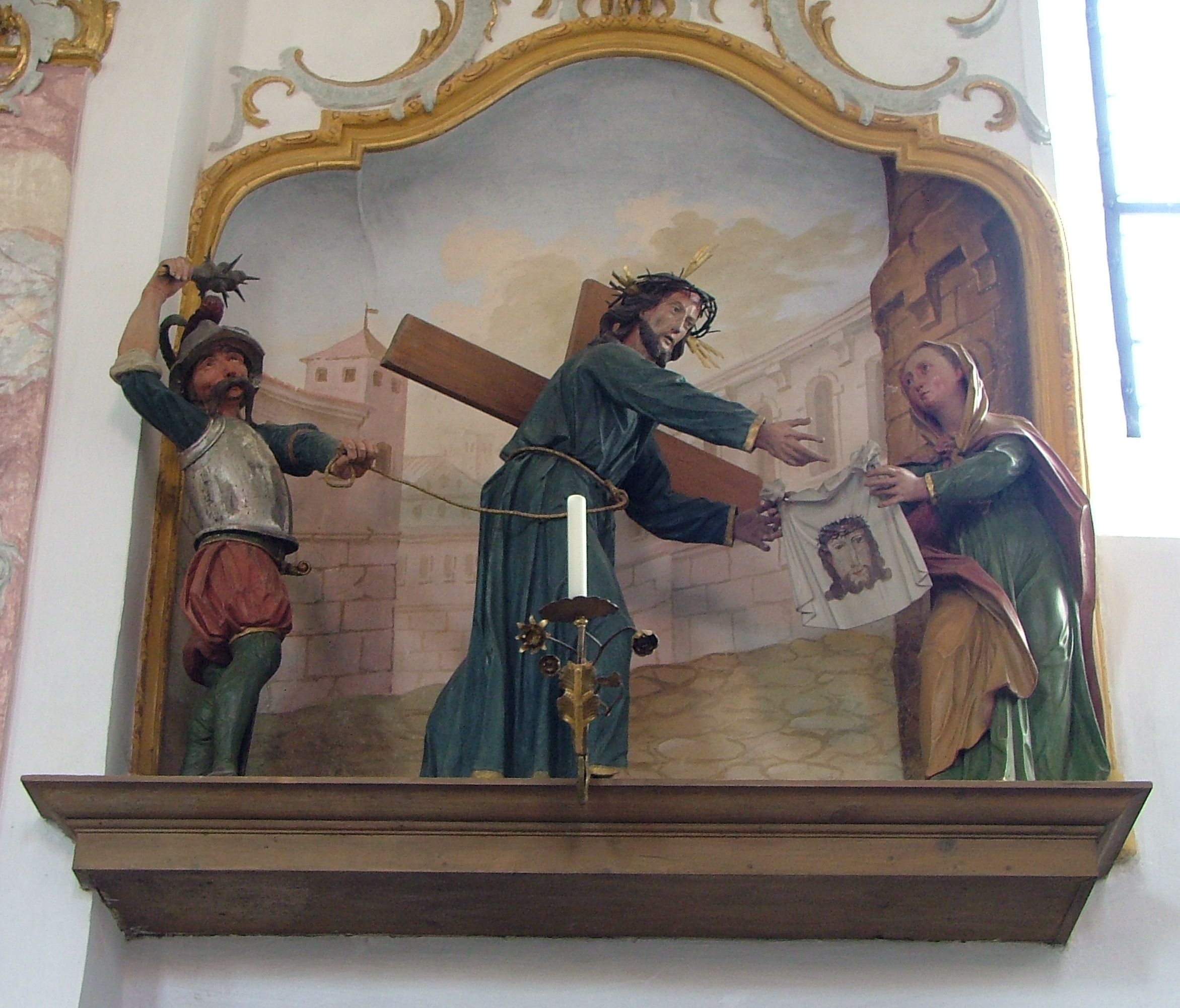 Orgineller Kreuzweg